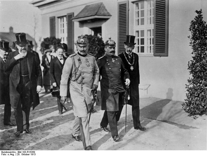 Einweihung des Kaiser-Wilhelm-Instituts für experimentelle Therapie in Dahlem Zentralbild Einweihung des Kaiser-Wilhelm-Instituts für experimentelle Therapie in Dahlem. Von links nach rechts: Minister von Trott zu Solz (die Hand am Bart), im Hintergrund (Zylinder in der Hand) Professor Neuberg, Kaiser Wilhelm II., Generalarzt Dr. A. von Ilberg, Professor Harnack (rechts mit Zylinder). Aufn. Illus [Einweihung am 28.10.1913] Abgebildete Personen: Wilhelm II.: Deutsches Reich, Kaiser, II., Deutschland Harnack, Adolf von Prof.: Theologe, Präsident der Kaiser Wilhelm Gesellschaft, Deutschland Neuberg, Carl Prof.: Biochemiker, Deutschland Ilberg, Friedrich von Dr.: Generalarzt, kaiserliches Heer, Deutschland (GND 117128694)